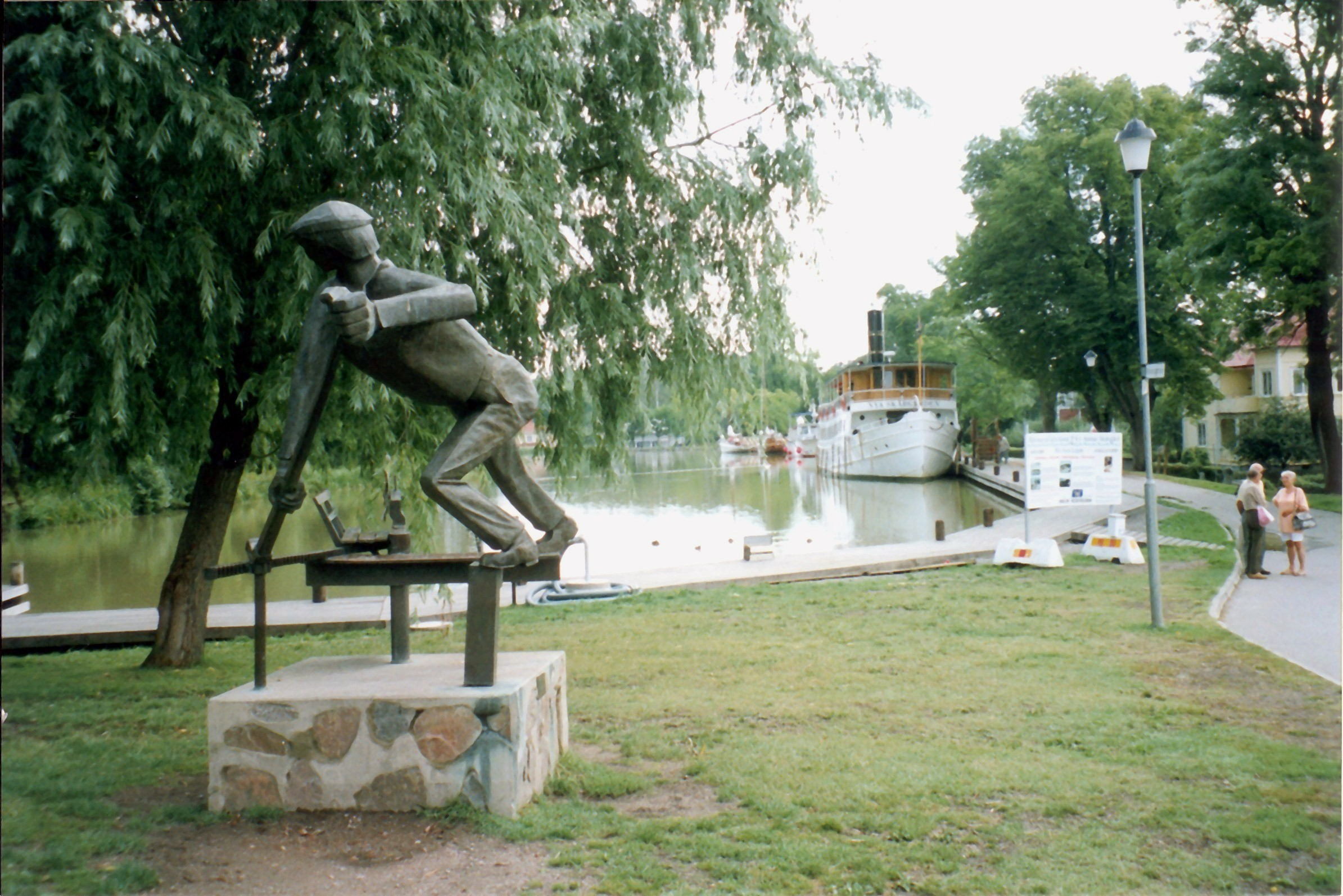 Göta kanal vid Söderköping i Östergötland. Slussvaktaren av Elis Nordh, 1982.